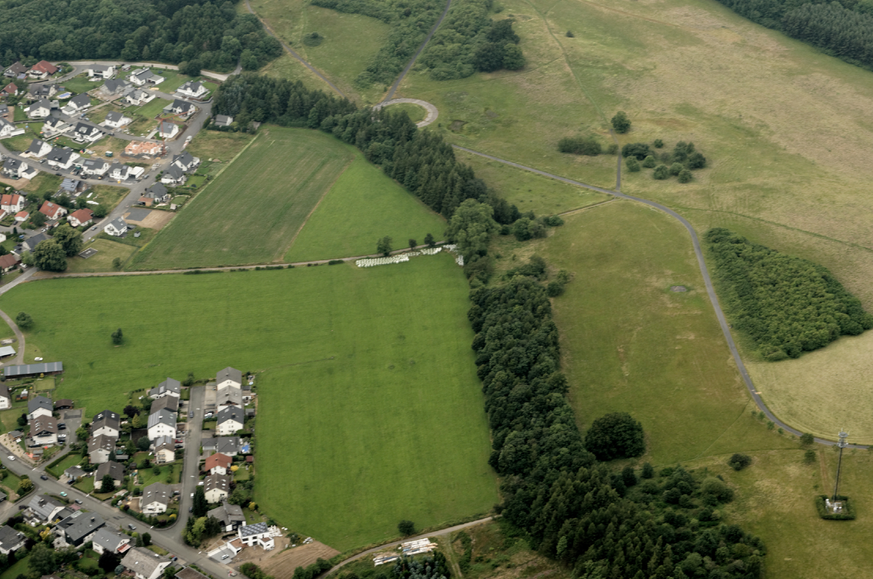 Fotoflug Sauerland Nord. Arnsberg-Müschede, ehemaliger Standortübungsplatz, Naturschutzgebiet Spreiberg, Blickrichtung Nordwest The making of this document was supported by the Community-Budget of Wikimedia Germany.